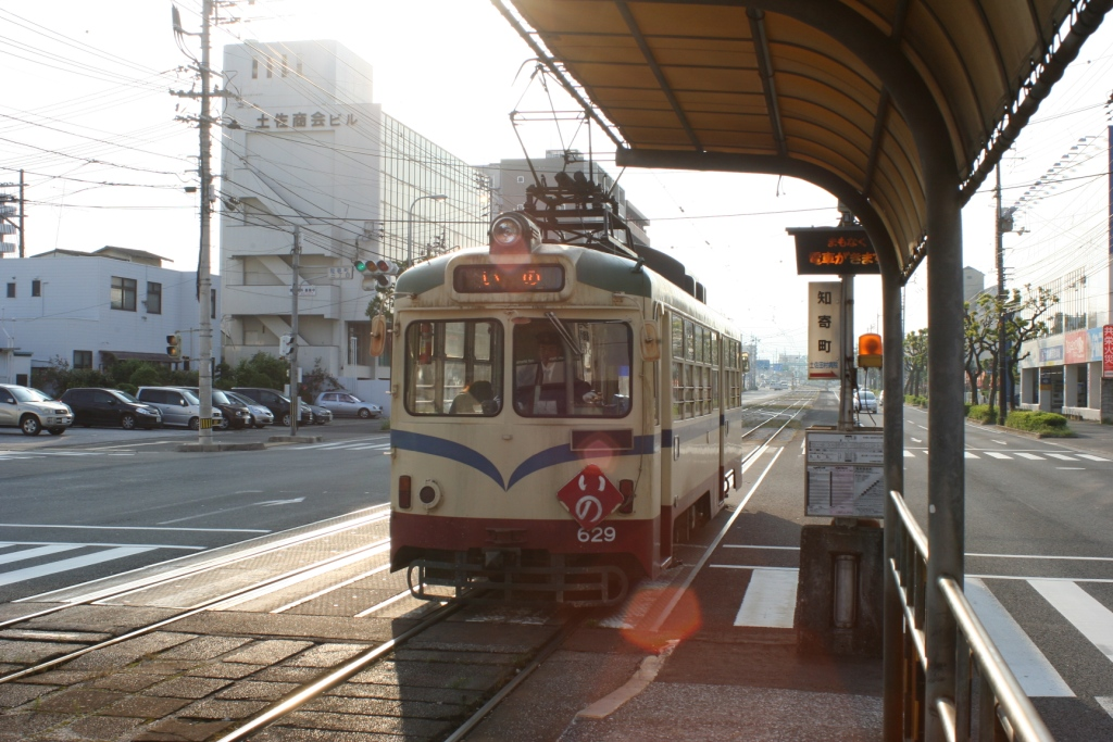 土佐電気鉄道 知寄町停留場